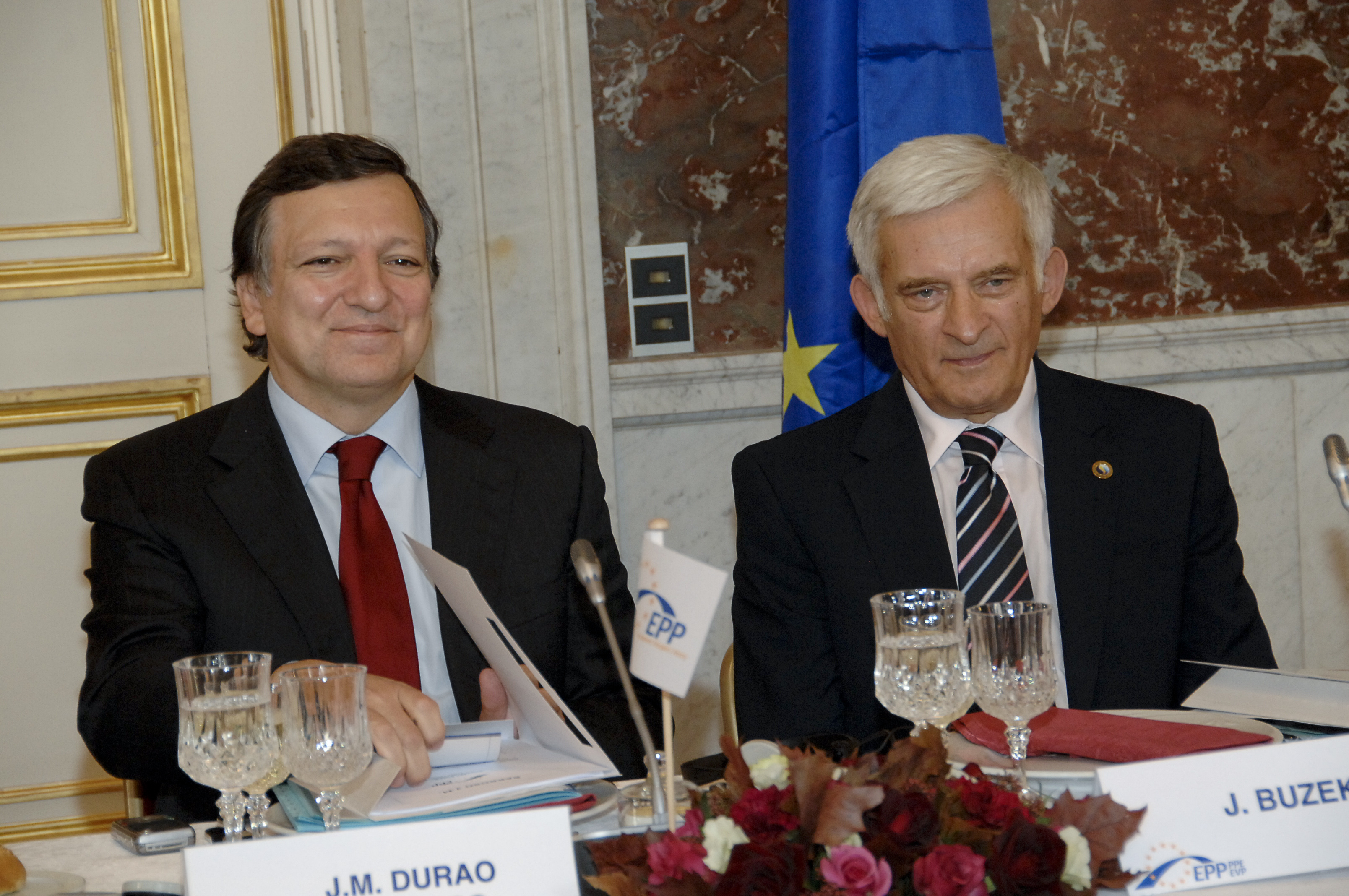 Jerzy Buzek and Jose Manuel Barroso during EPP Summit in Brussels, 2009